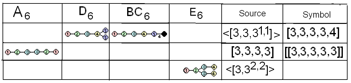 Coxeter-Dynkin diagram